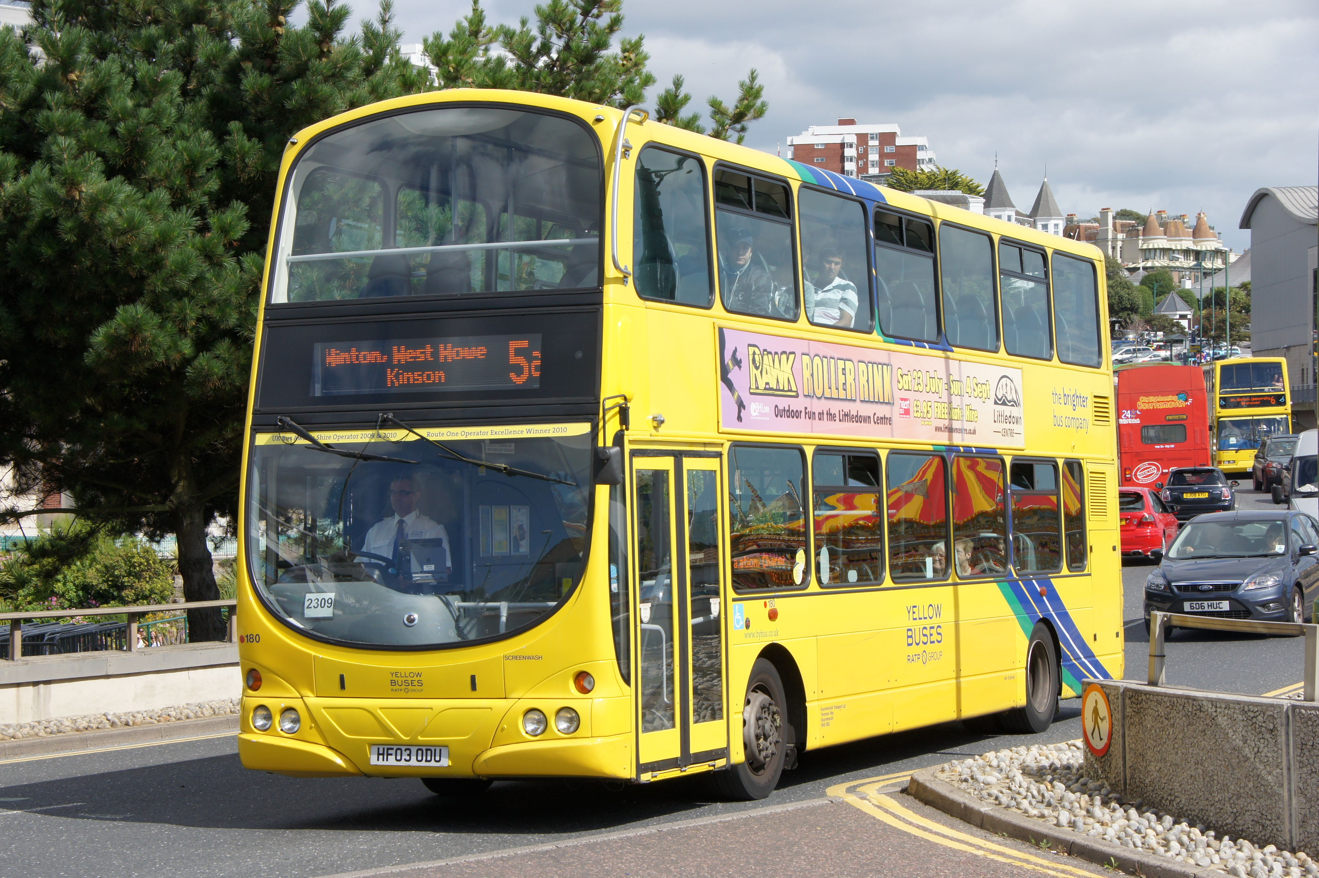 HF03ODU-1 290811 CPS